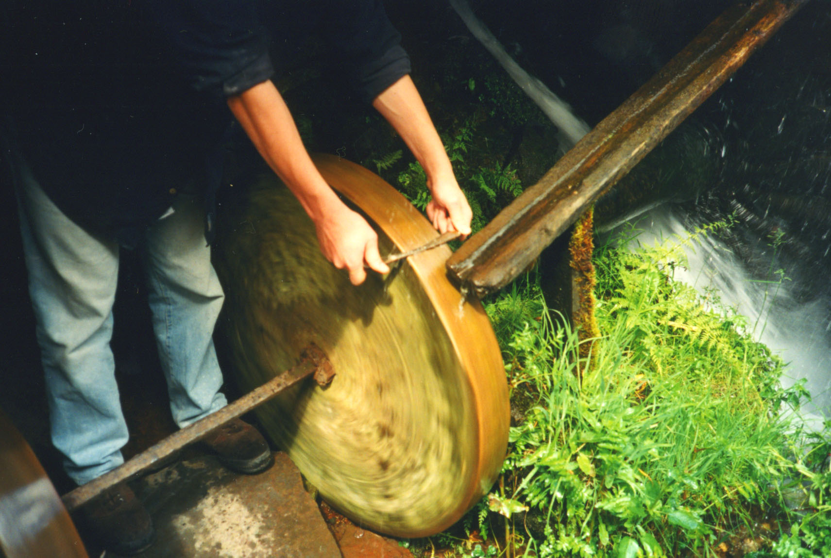 Taramundi (Asturias, España), conjunto etnográfico de Os Teixois. Piedra de afilar; fotografía en papel. Taramundi (Asturias, Spain), Os Teixois ethnographic site, whetstone. Paper photograph.